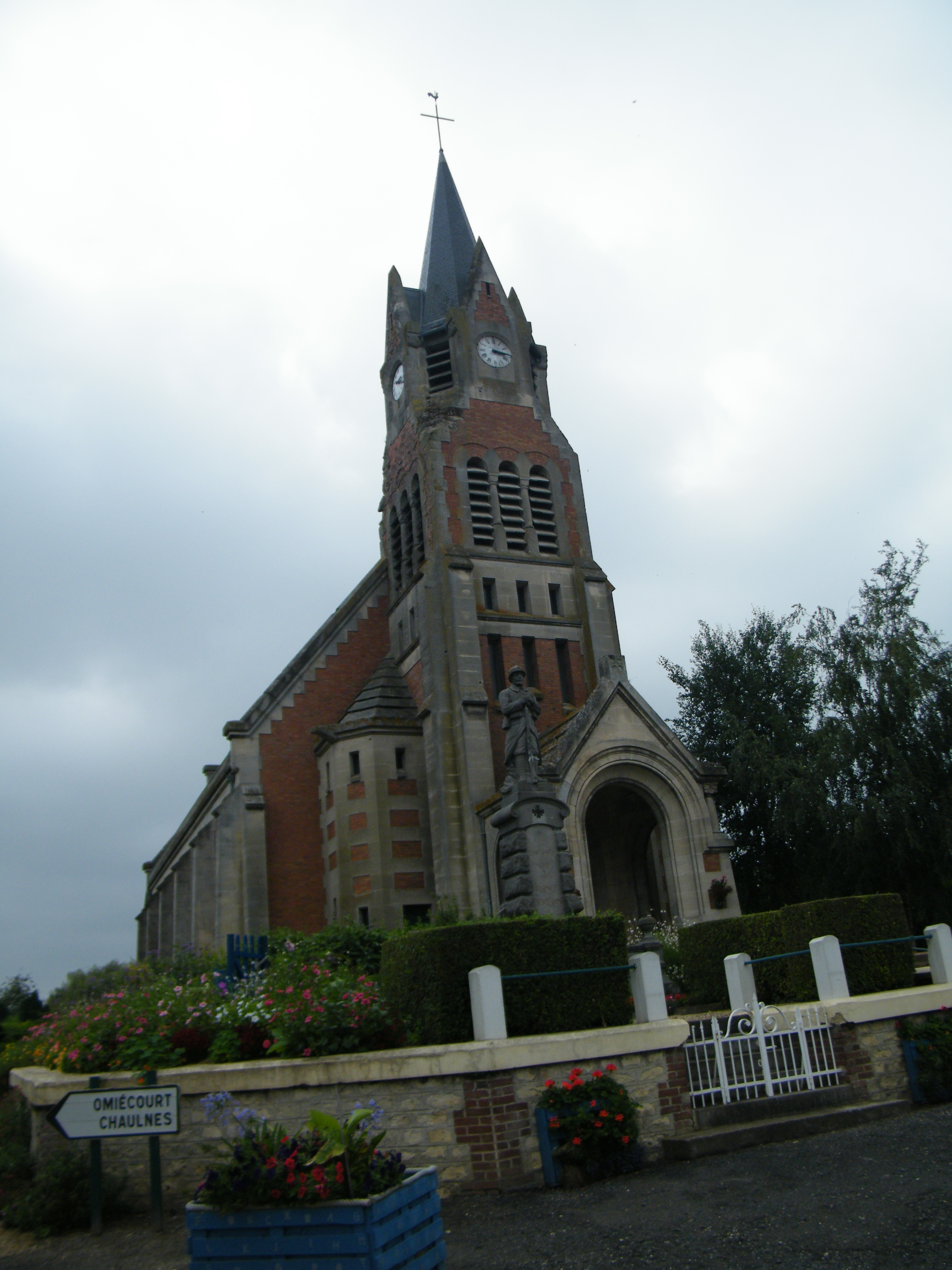 église.